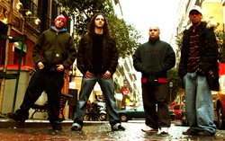 Componentes de FreakMind